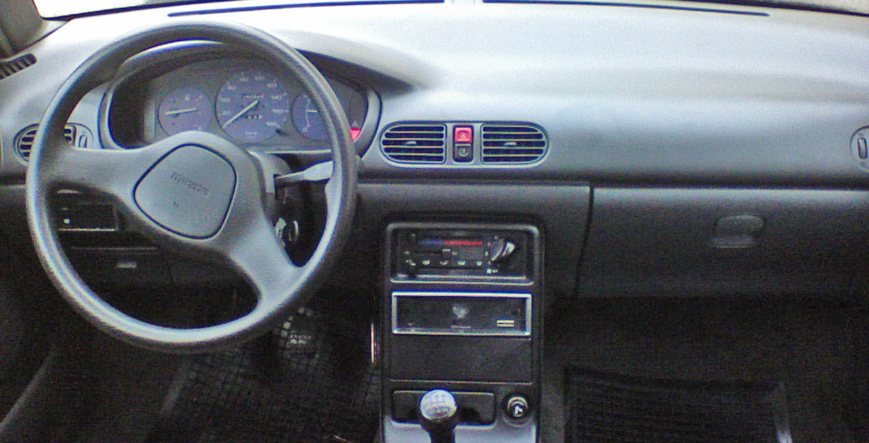 De Mazda 121 vu bannen.